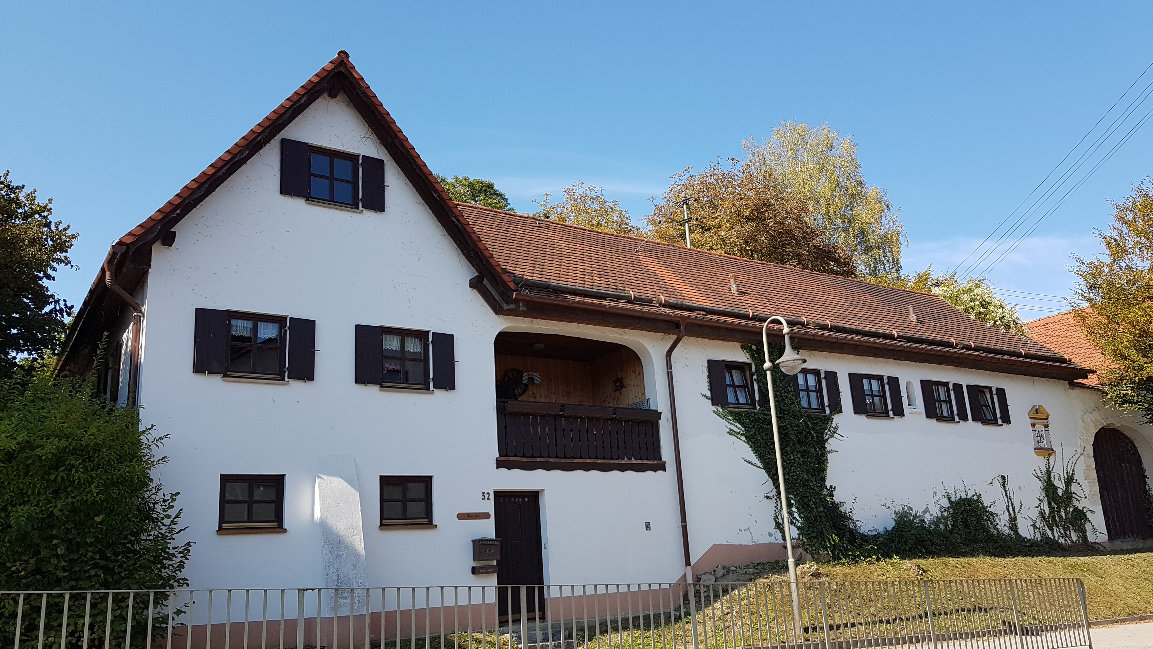 Bachern (Friedberg), ehemaliges Nebengebäude des abgegangen Schloss Bachern.